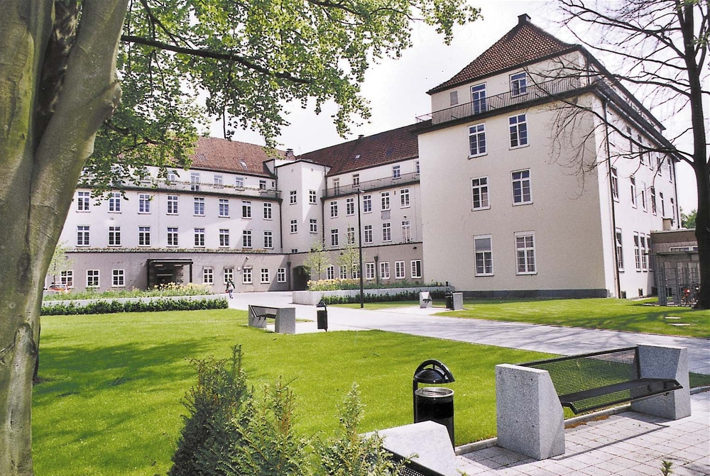 Klinikgebäude Knappenstrasse